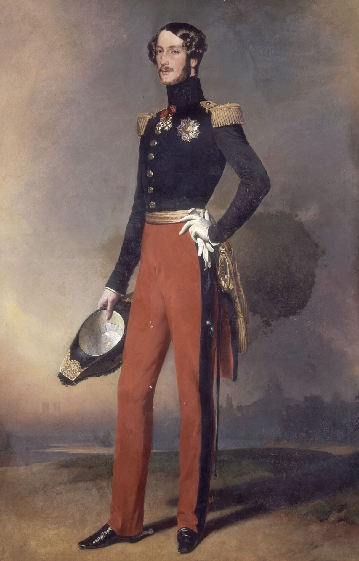 Ferdinand Philippe, Duke of Orléans, in front of a panorama of Paris